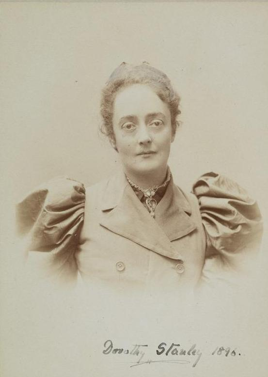 Dorothy Tennant, Lady Stanley (1855-1926), englische Malerin